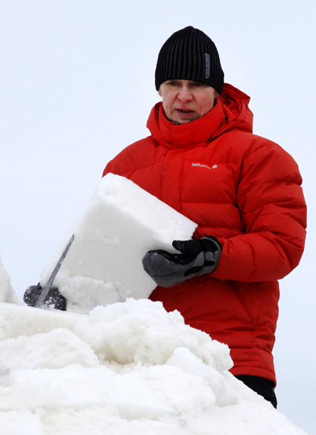 Anu Nõulik